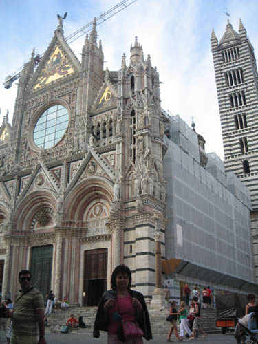 Дуомо в Сиене